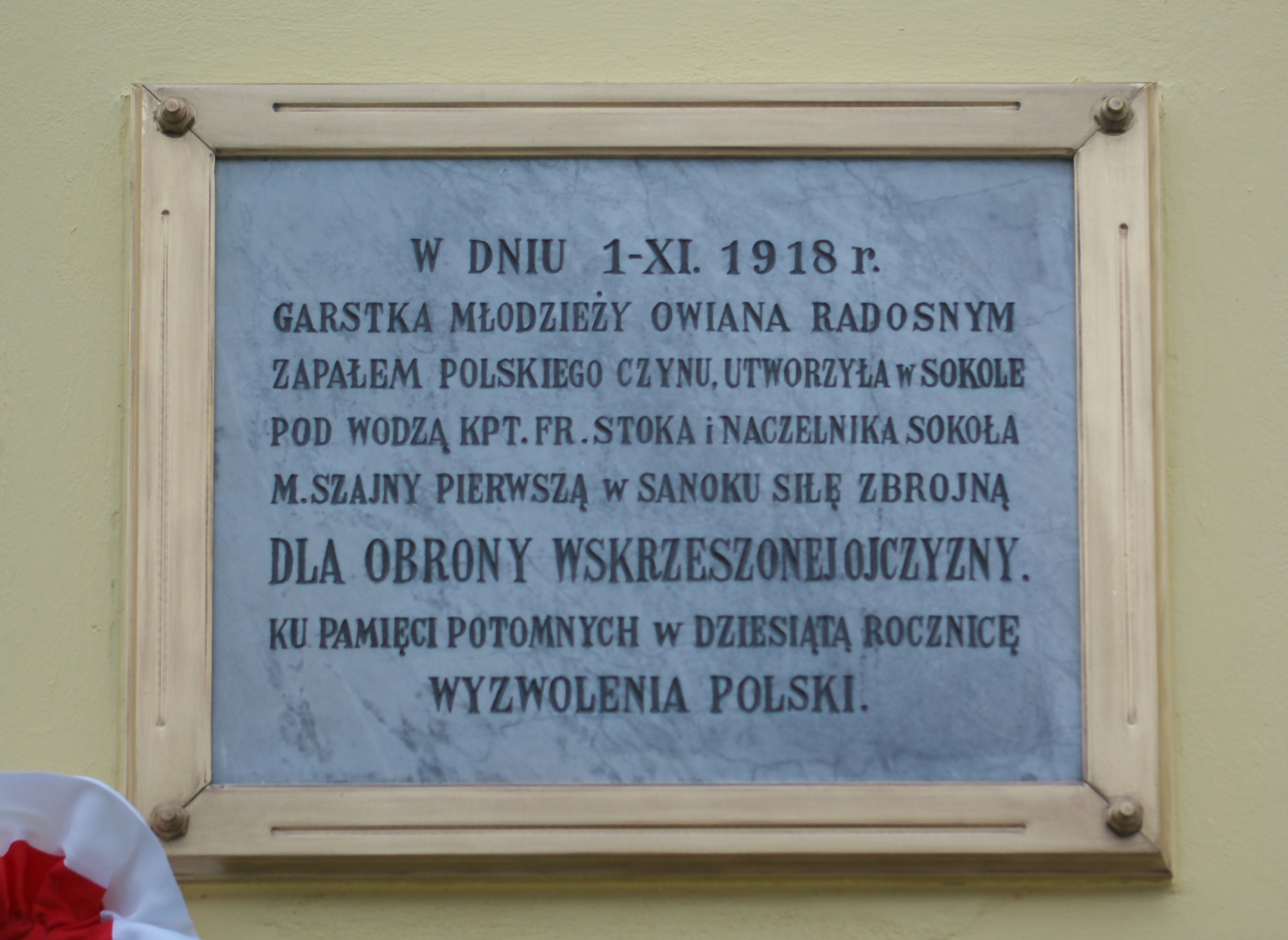 Tablica z 1928 na gmachu Polskiego Towarzystwa Gimnastycznego „Sokół” w Sanoku dla upamiętnienia 10. rocznicy odzyskania niepodległości i wymarszu pierwszych polskich patroli z sanockiego Sokoła w dniu 1 listopada 1918 roku. Odnowiona w 2014.